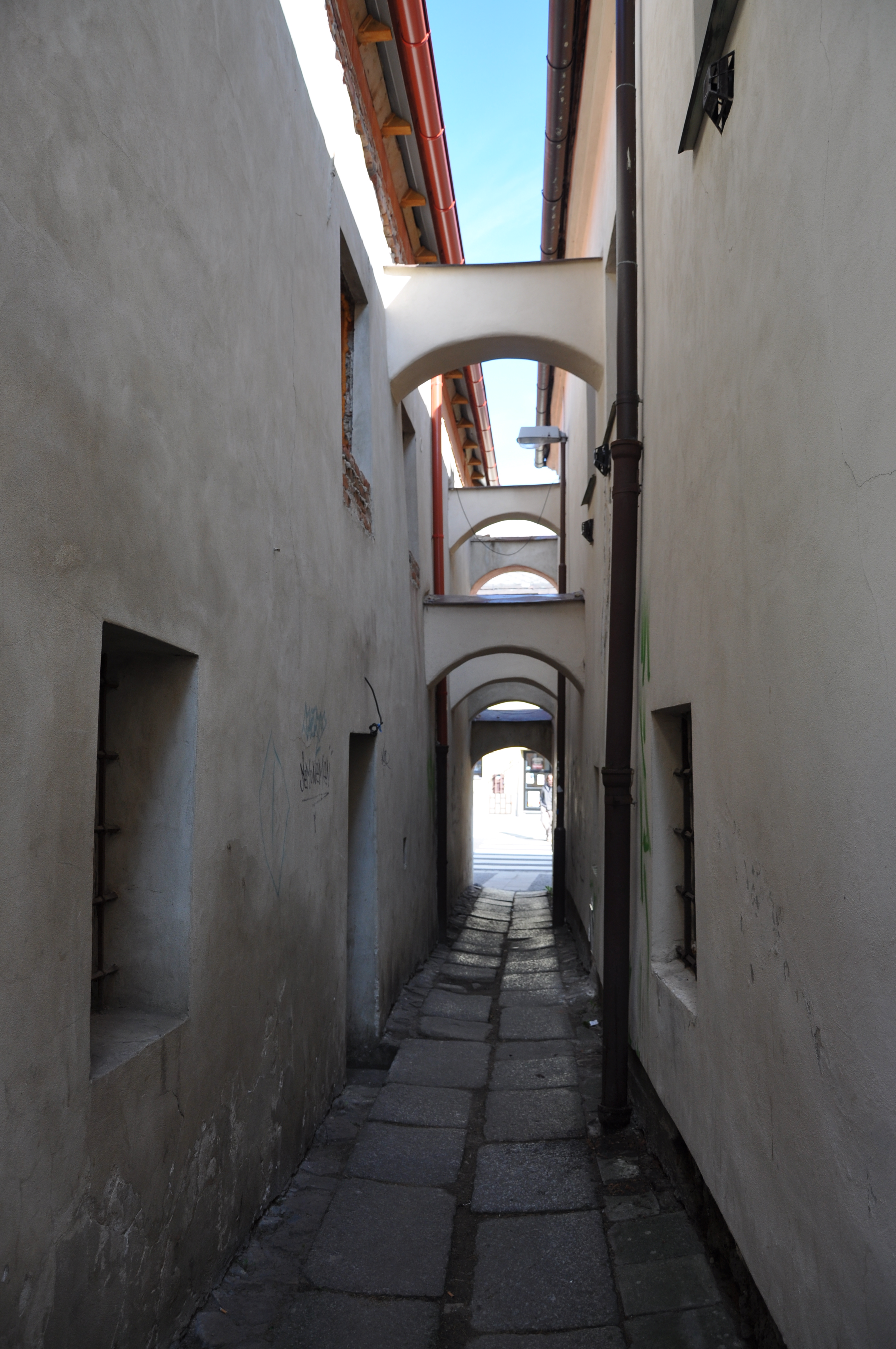 Židovská čtvrť ve Velkém Meziříčí